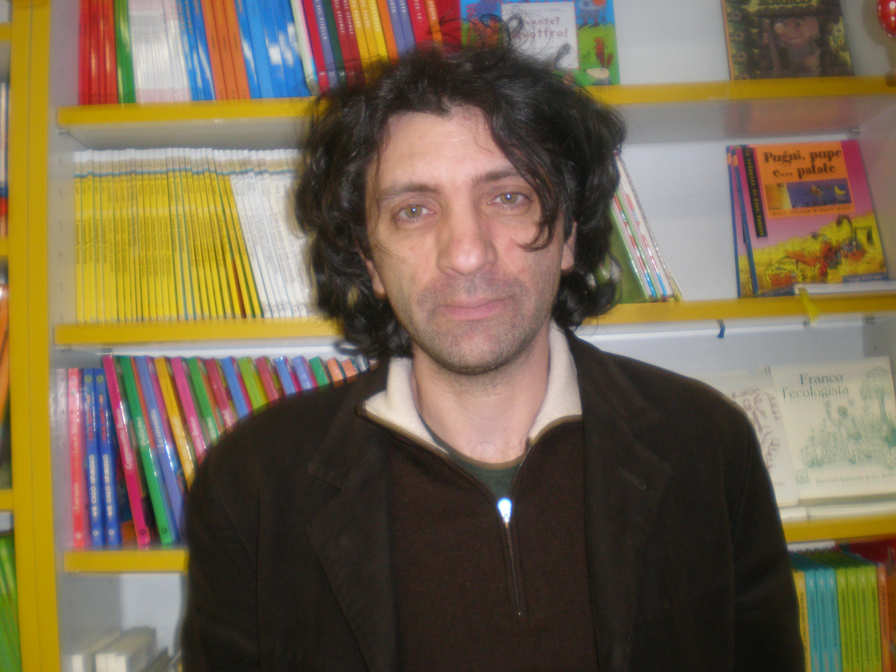 Antonio Pascale, scrittore italiano